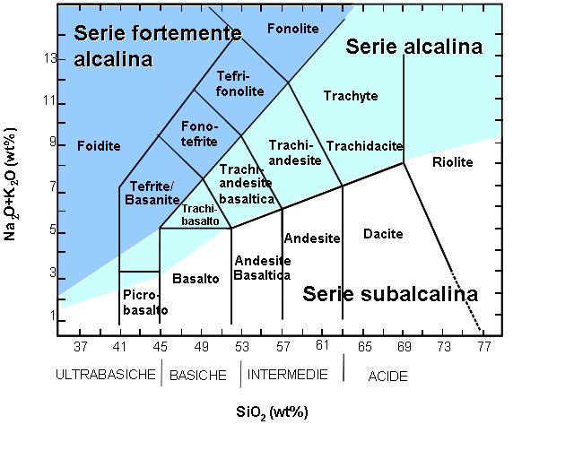 Diagramma TAS